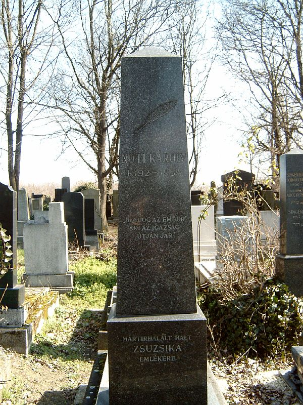 Nóti Károly (Karl Noti - német nyelvterületen) (Tasnád - ma Tăşnad,(Szatmár megye, R., 1892. február 1. - Budapest, 1954. május 28.) író, újságíró, filmforgatókönyv-író, kabarészerző sírja Budapesten. Kozma utcai izraelita temető: 1C-6-21.